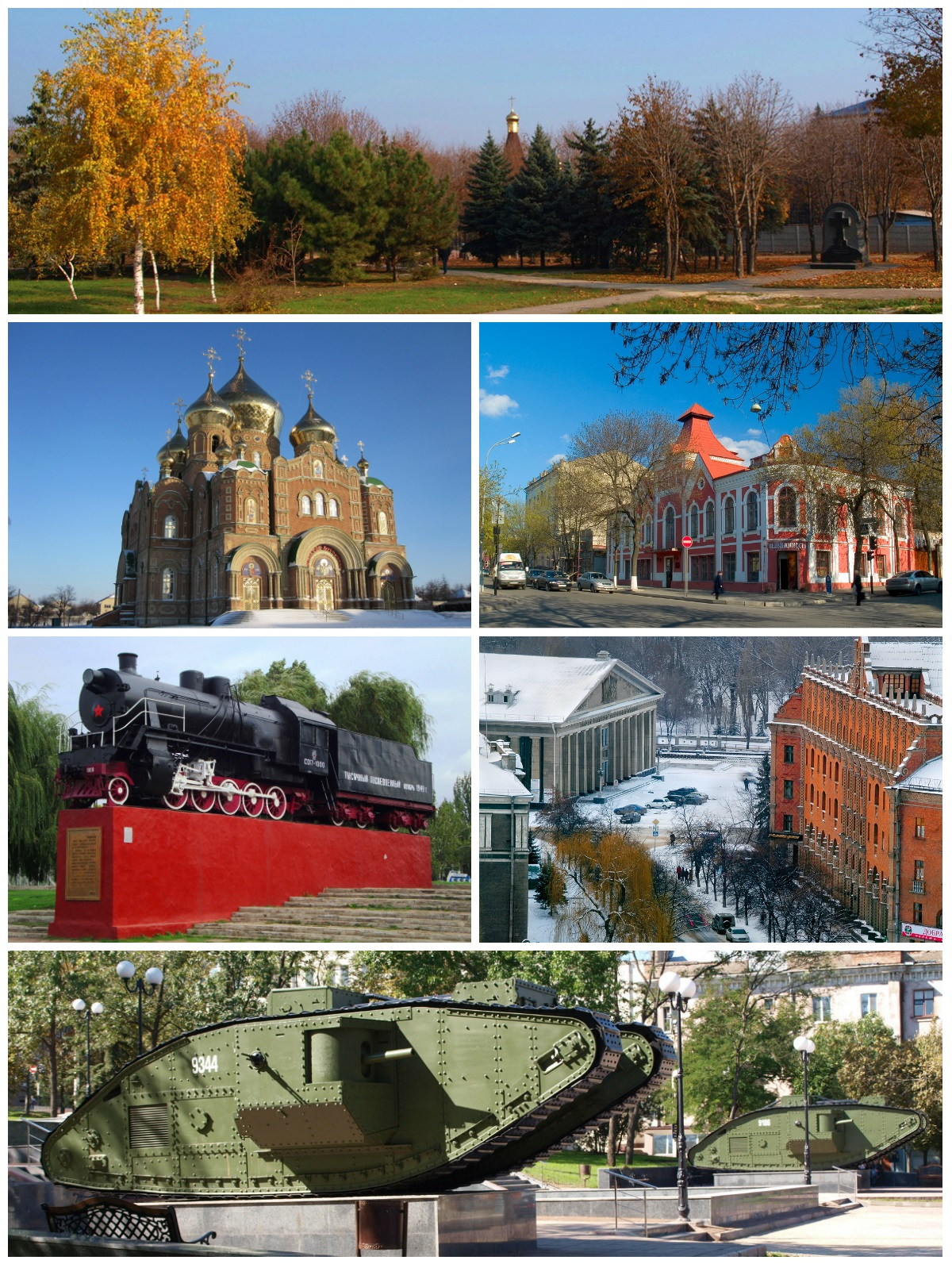 Колаж Луганська. Вгорі — Парк пам'яті. У центрі за годинником: музей історії та культури Луганська (колишня міська управа); вулиця Пушкінська (ліворуч — Обласний палац культури, праворуч — готель «Україна»); перший повоєнний паровоз луганського тепловозобудівного заводу; Свято-Володимирський кафедральний собор. Знизу — британські танки Mark V.